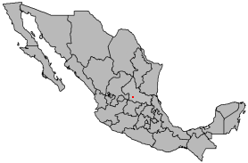 Locator map of San Luis Potosí, San Luis Potosí, Mexico